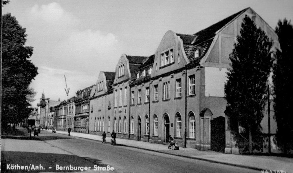 Fotografie der Bernburger Straße in Köthen. Angepfeilt ist das Corpshaus der Markomannia.